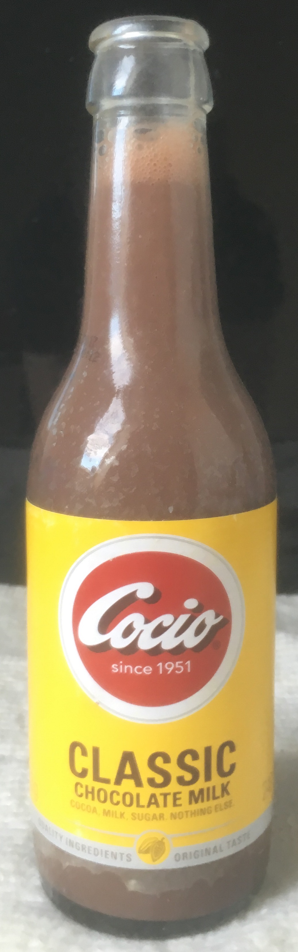 240 ml Cocio fra Danmark i 2015.